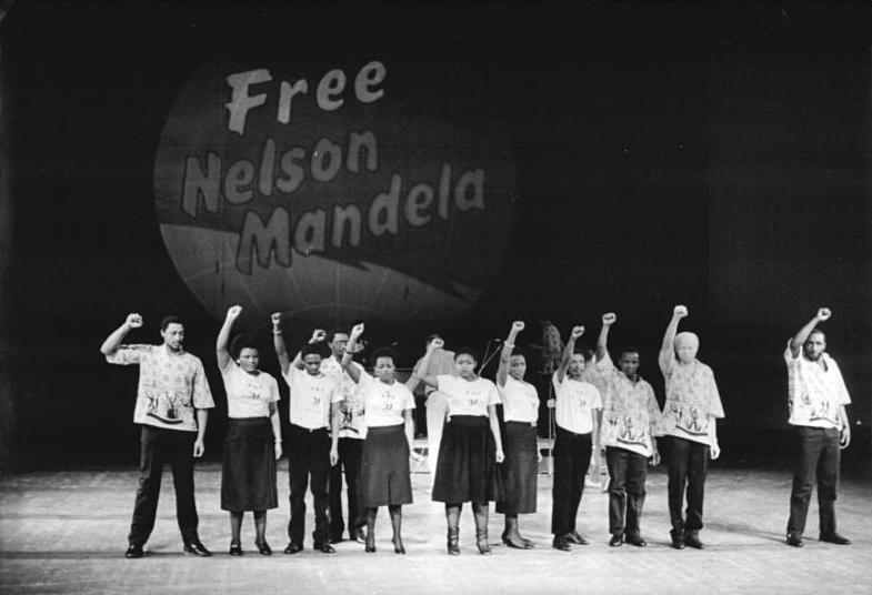 Berlin, Weltgewerkschaftskongress, Probe des Festprogramms ADN-ZB Senft 20.9.86 Berlin: Weltgewerkschaftskongreß - "Viva Mandela" -Afrikanische Lieder und Tänze - gestaltet die Gesangsgruppe des ANC im Ensemble "Solidarität" der Karl-Marx-Universität Leipzig beim Festprogramm im Friedrichstadtpalast für die Teilnehmer des XI. Weltgewerkschaftskongresses. -Foto von der Generalprobe